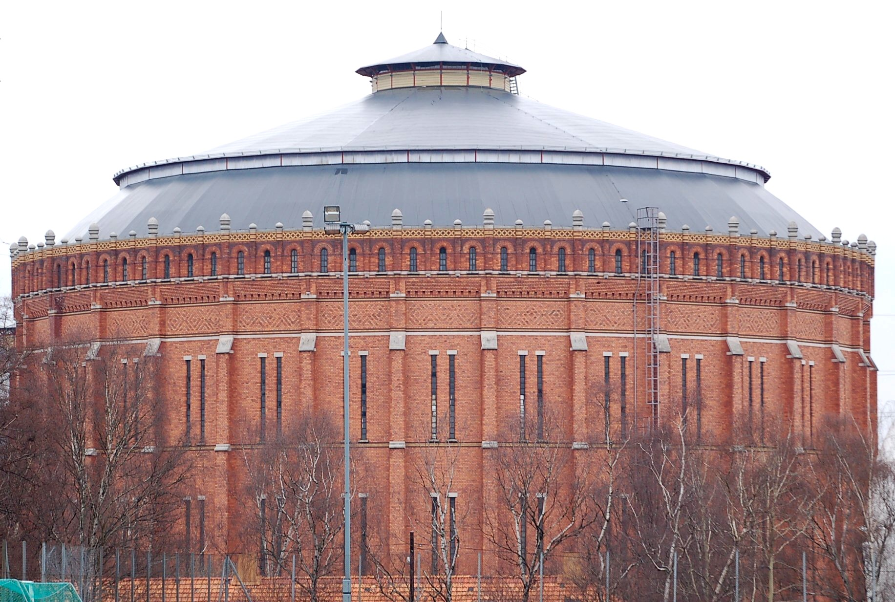 Helbild av den andra gasklockan i Värtagasverket i Hjorthagen, Stockholm. Arkitekt Ferdinand Boberg. Vy från Hjorthagens idrottsplats. April 2006. Fotograf: FriskoKry.